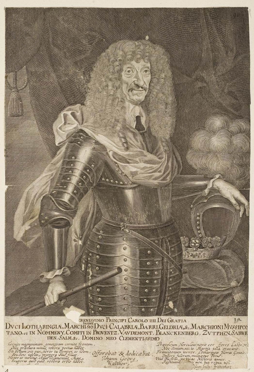 Grafik aus dem Klebeband Nr. 1 der Fürstlich Waldeckschen Hofbibliothek Arolsen Motiv: Karl IV., Herzog von Lothringen